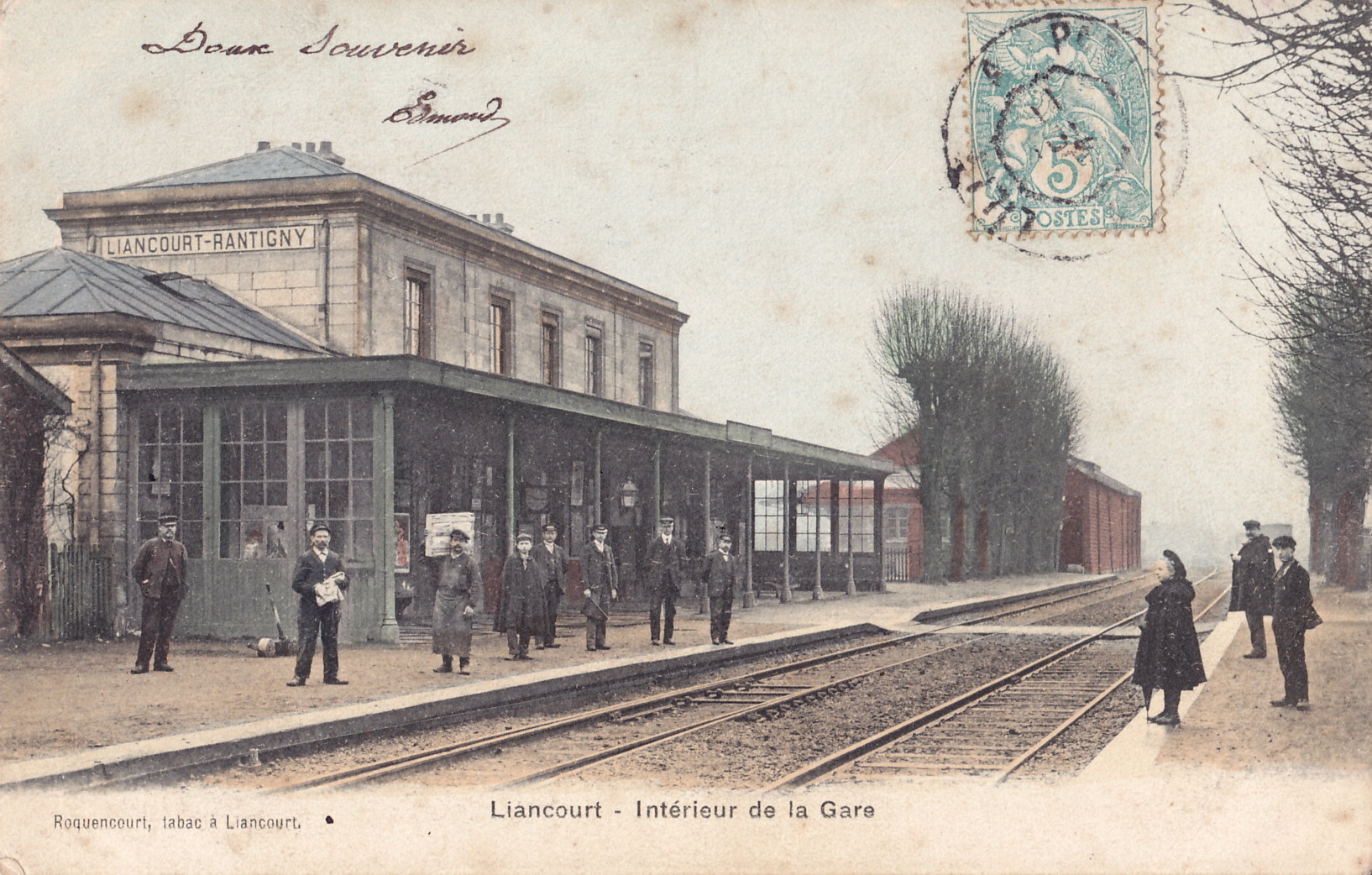 Carte postale ancienne éditée par Roquencourt, tabac à Liancourt : LIANCOURT - Intérieur de la Gare